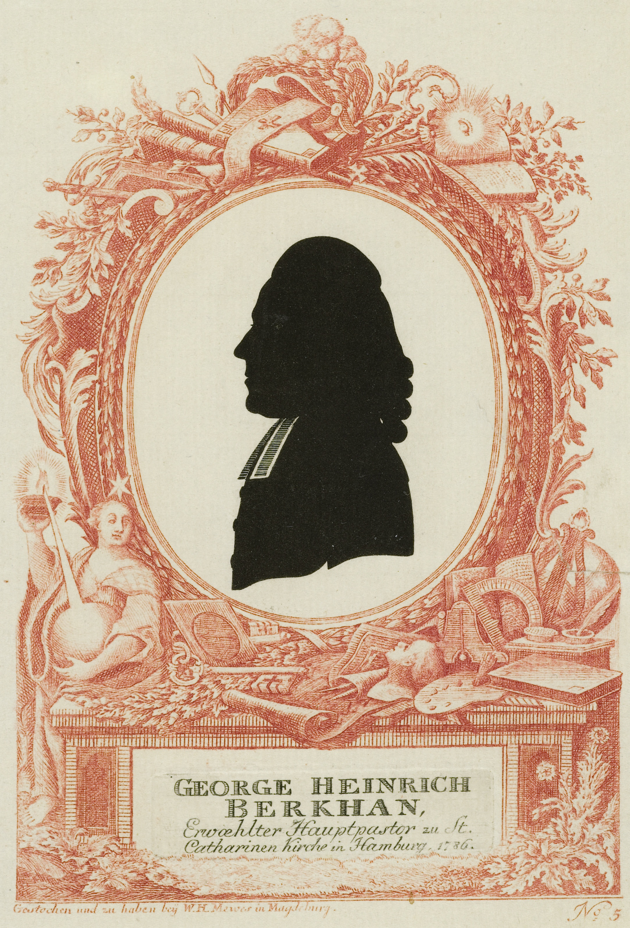 George Heinrich Berkhan